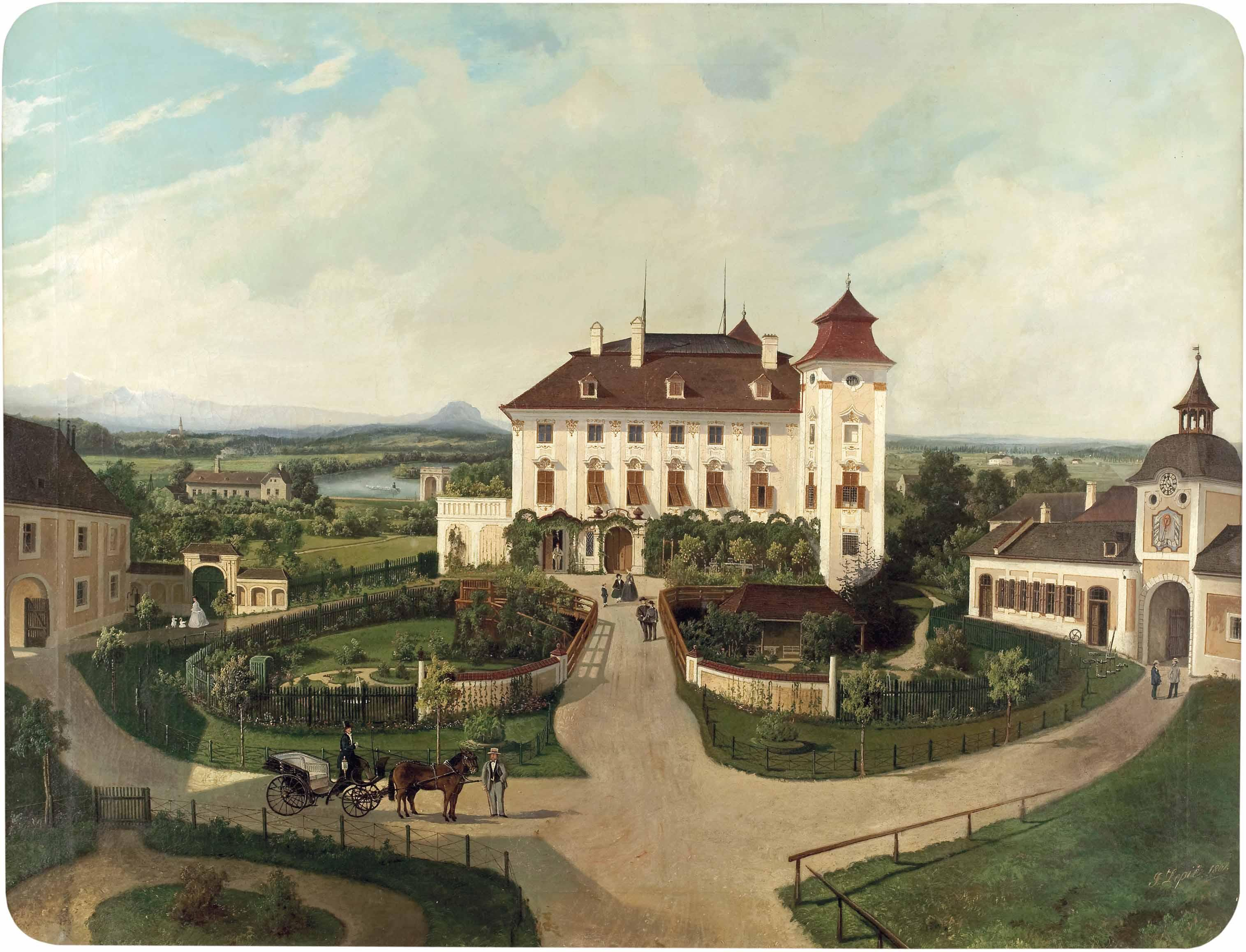 Schloss Lichtenegg (bei Wels) mit Nebengebäuden und Blick in die Landschaft; unten rechts signiert: F. Lepie, datiert: 1862, Öl auf Leinwand, ca. 102 x 137 cm